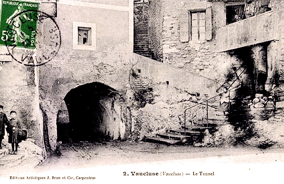 Fontaine de Vaucluse, la voûte arrondie, taillée dans le roc vif, où se réfugiait Pétrarque en été